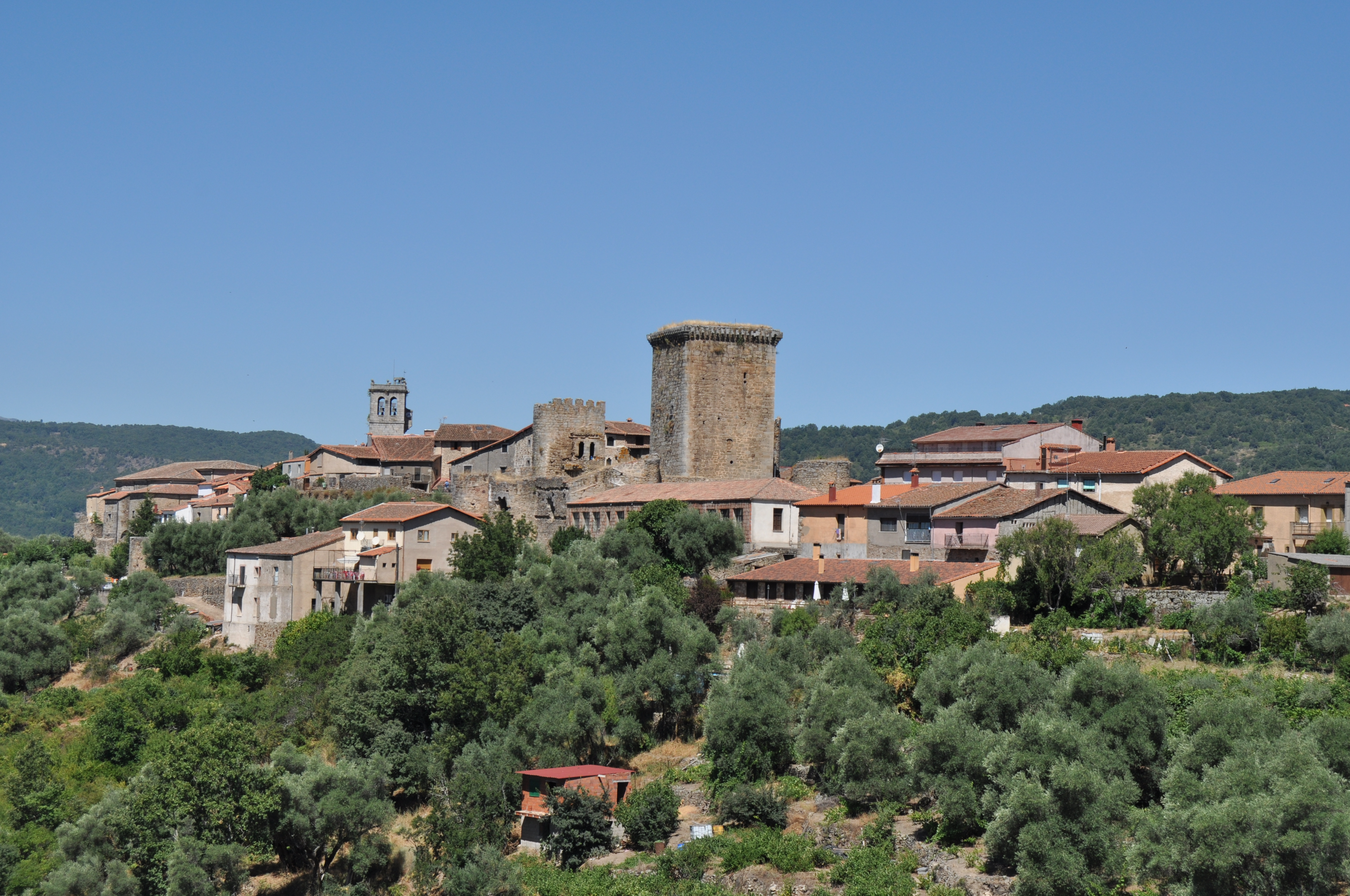 Miranda del Castañar - 002